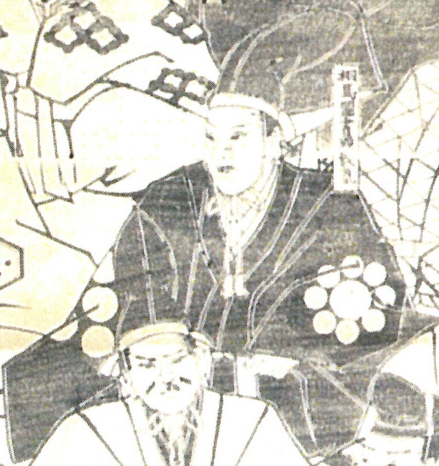 相馬叙胤の画像(「相馬家歴代藩主像」より)。